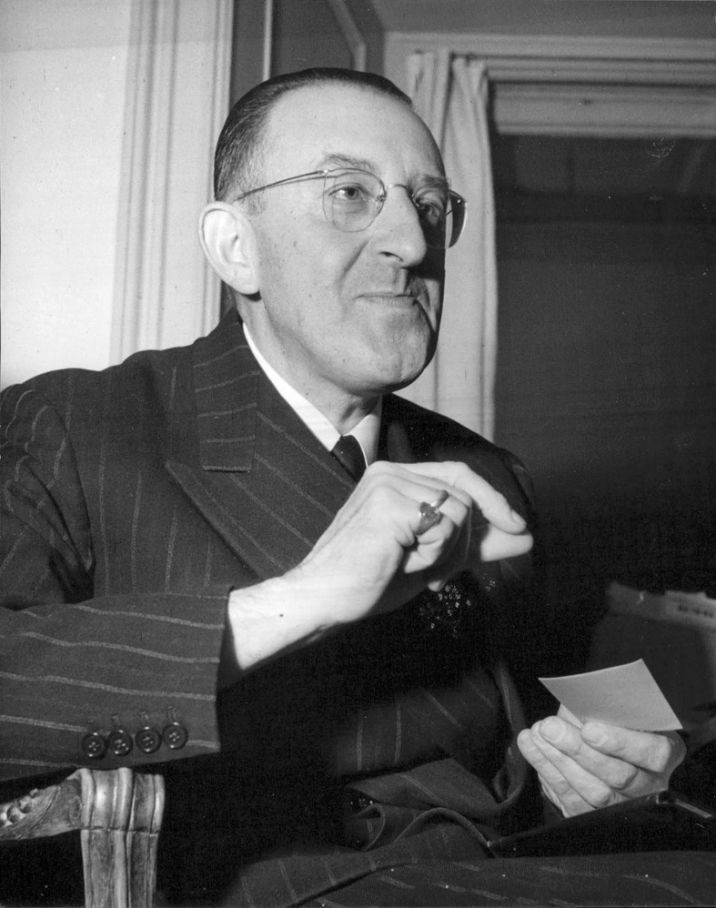 Dr A. Martin de Wild från Haag och van Megerens Vermeerförfalskning "Kristus i Emaus".